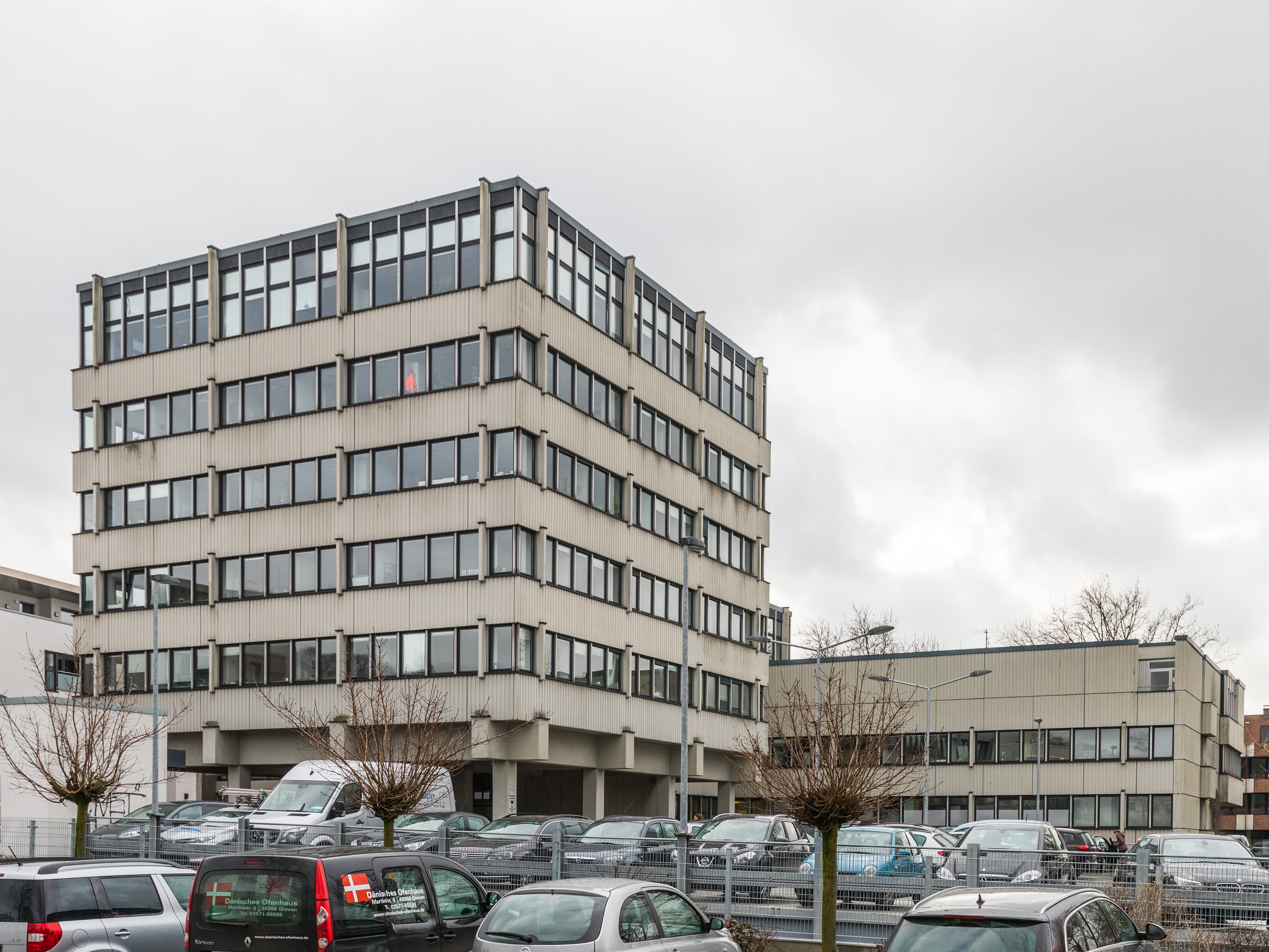 Rathaus Greven. Architekt: Dieter Oesterlen, Bauzeit: 1973